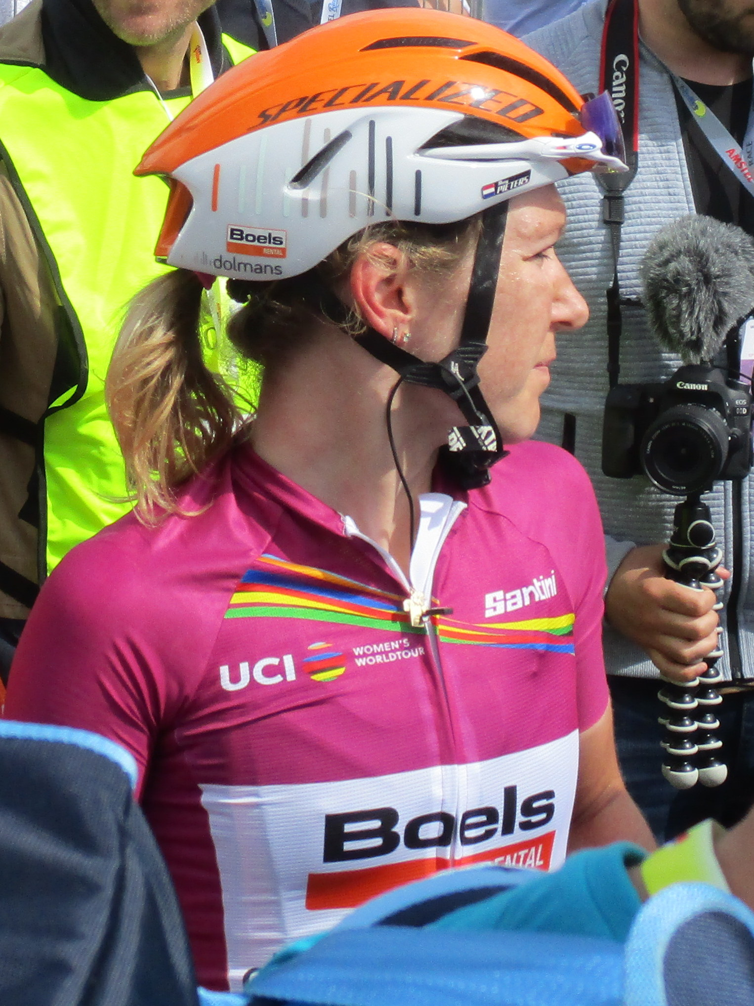 Finish van de Amstel Gold Race Ladies Edition 2018 in Berg, Valkenburg aan de Geul.